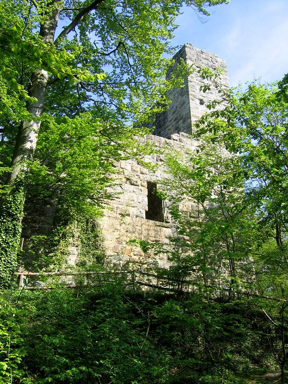 Burgruine Blankenhorn in Güglingen, Stadtteil Eibensbach